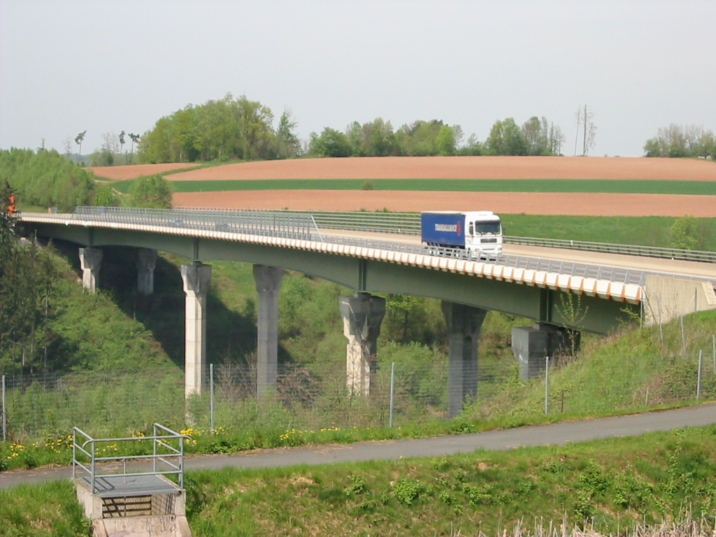 Viaduc de Criviller Ouvrage d'art sur la RN 59 Déviation de Baccarat (Meurthe-et-Moselle) Photographie personnelle, prise le 4 mai 2006 Copyright © Christian Amet